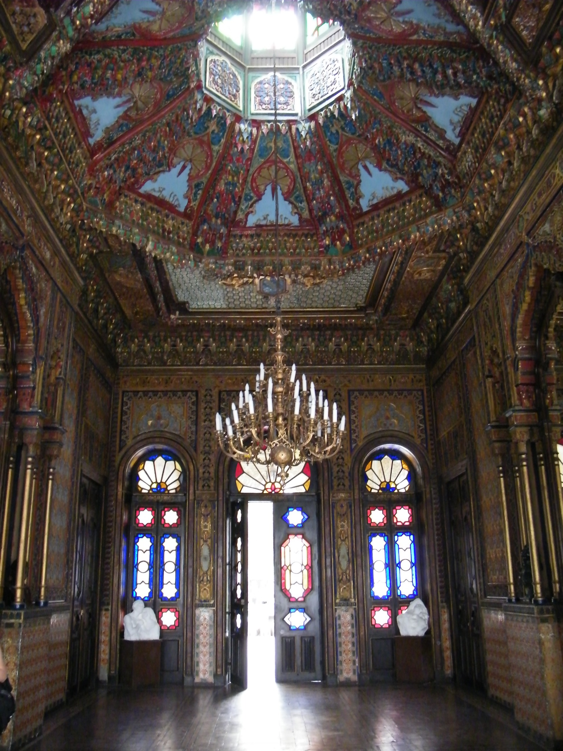 Palacio de La Alhambra This is a photo of a national monument in Chile: 1614